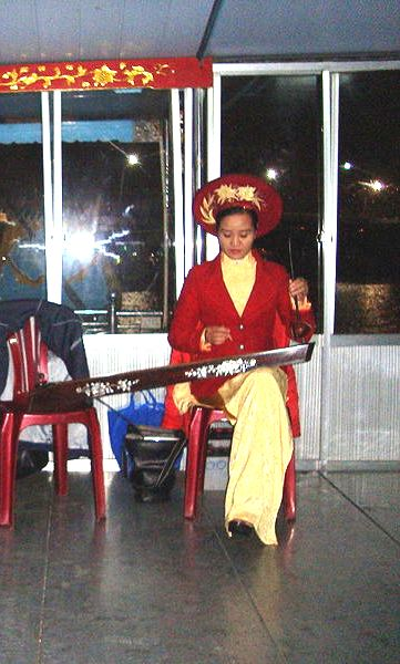 Thiếu nữ chơi đàn bầu